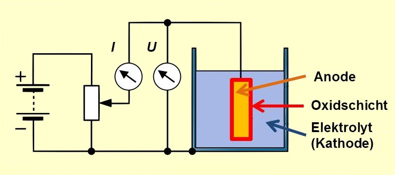 Prinzipdarstellung der Formierung